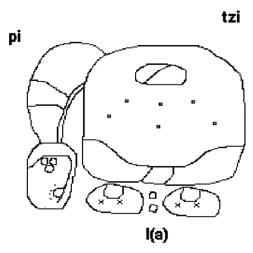 Beschreibung: Maya Glyphe für das Substantiv "Ballspieler / ballplayer" * Quelle: selbst gemalt, * Literatur: Michael D. Coe: Das Geheimnis der Maya Schrift. 1890-ISBN 3-499-603462, 1995, Reinbek bei Hamburg * Zeichner: --Zahnstein